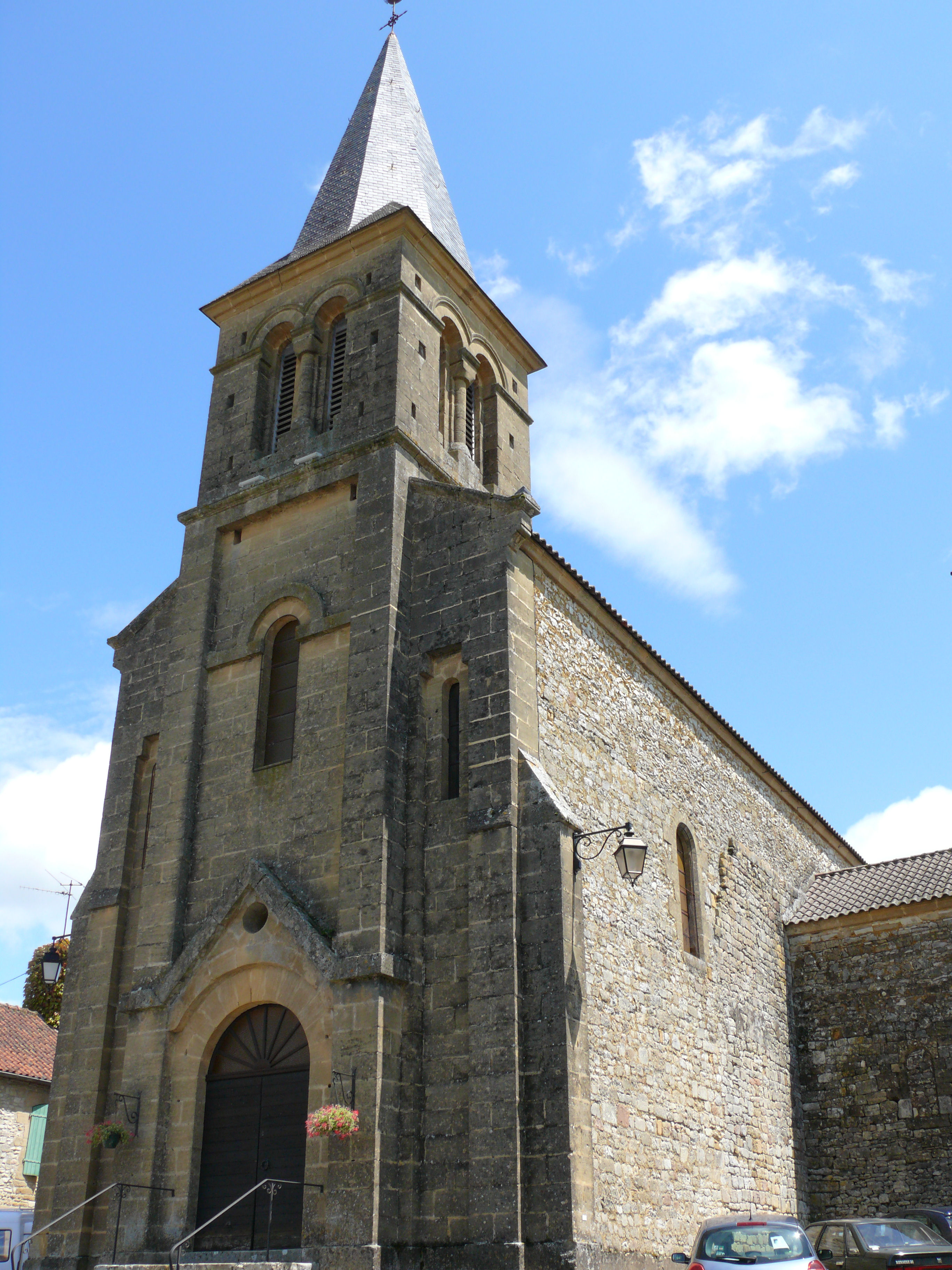 Campagnac-leè-Quercy - Eglise